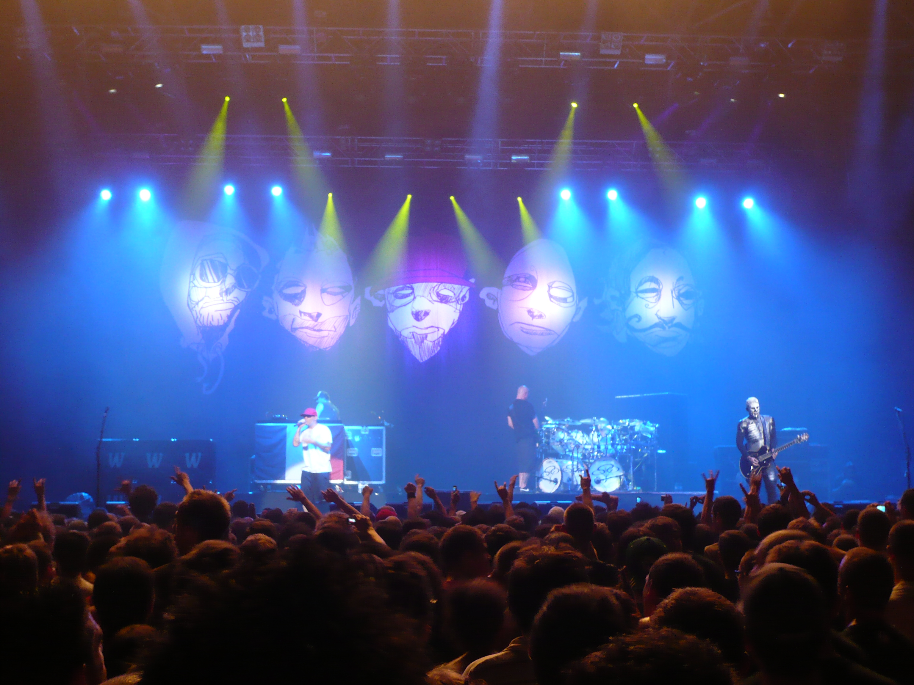 Limp Bizkit on Le Zénith, Paris